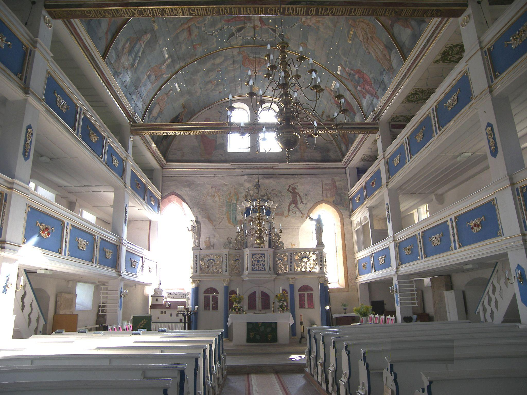 Altarraum Mühlberger Kirche